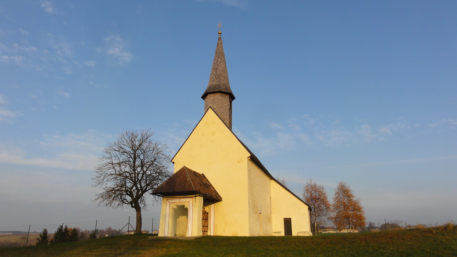 Kath. Filialkirche hl. Nikolaus und ehem. Friedhofsfläche